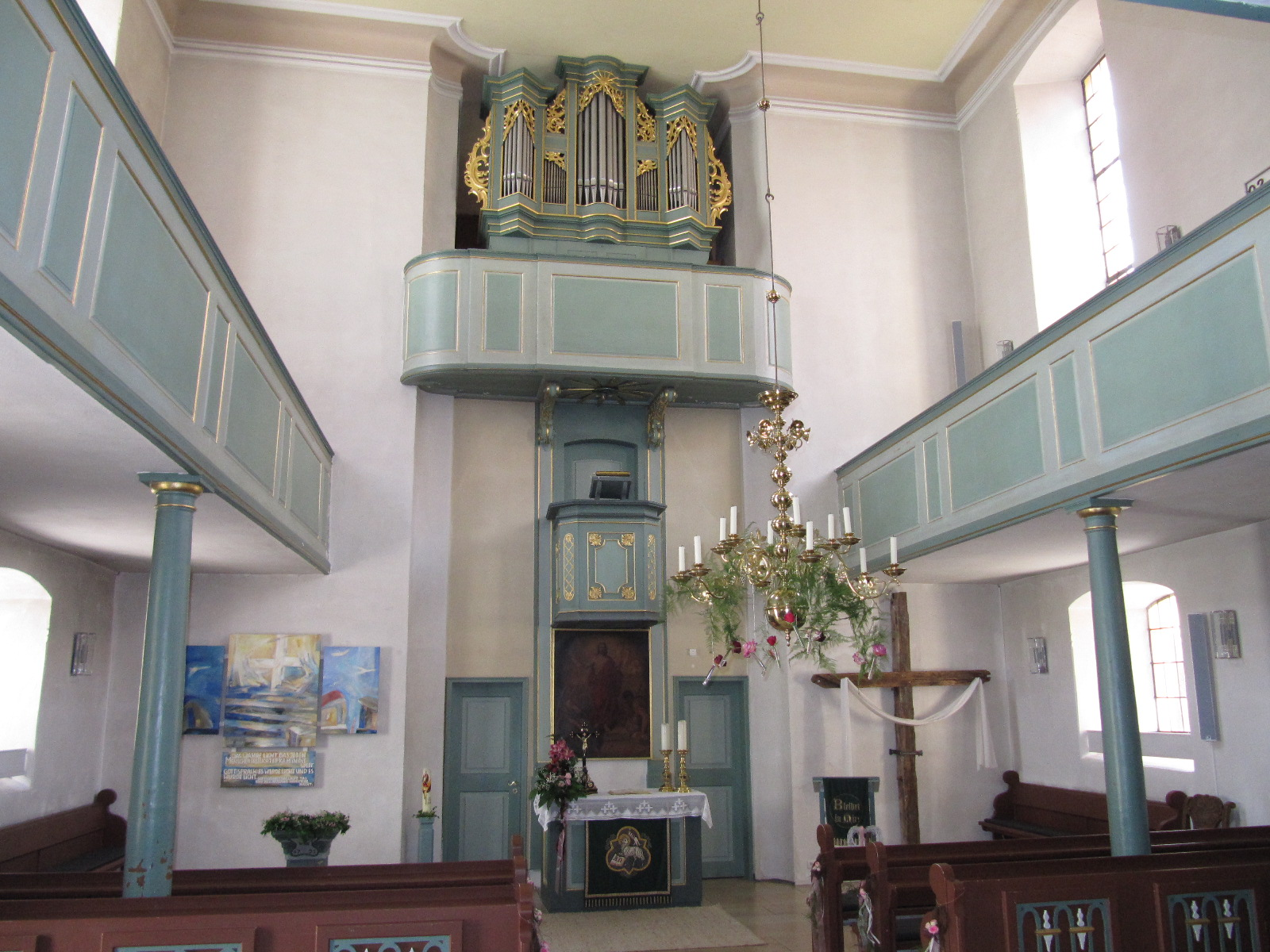 Kanzelwand in der Markgrafenkirche von Rödelsee